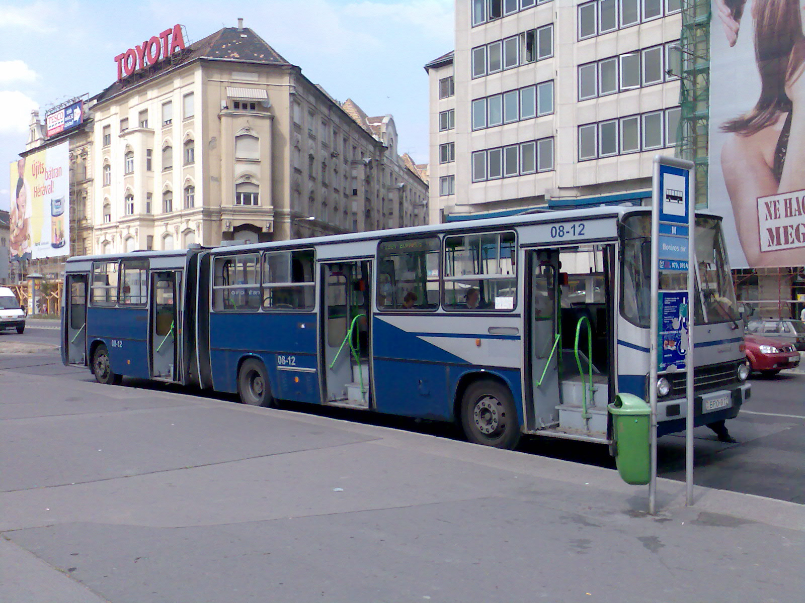 Ikarus 280 típusú autóbusz (Budapest, IX. ker., Boráros tér)